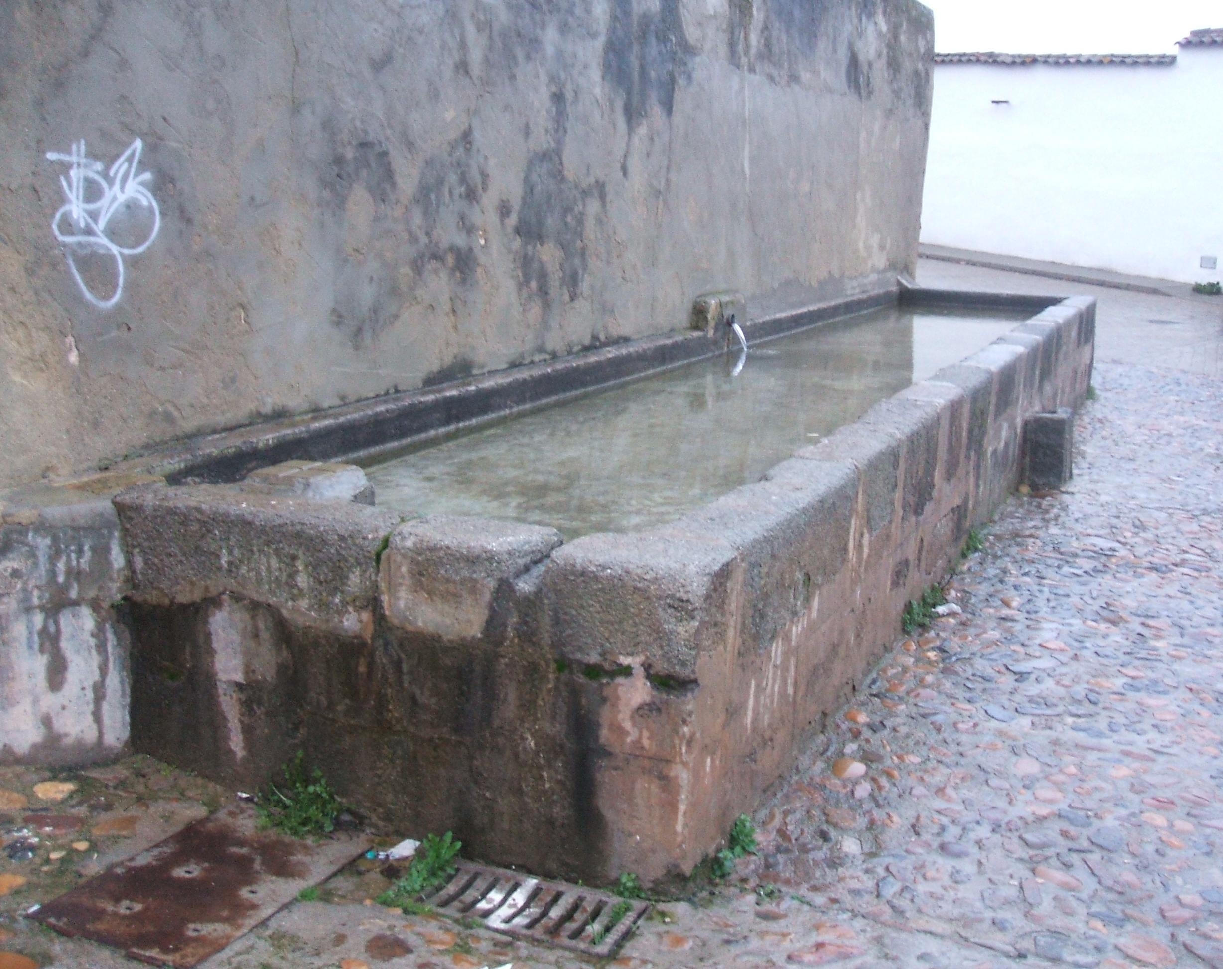 Fregenal de la Sierra abrevadero Abrevaderos de Extremadura